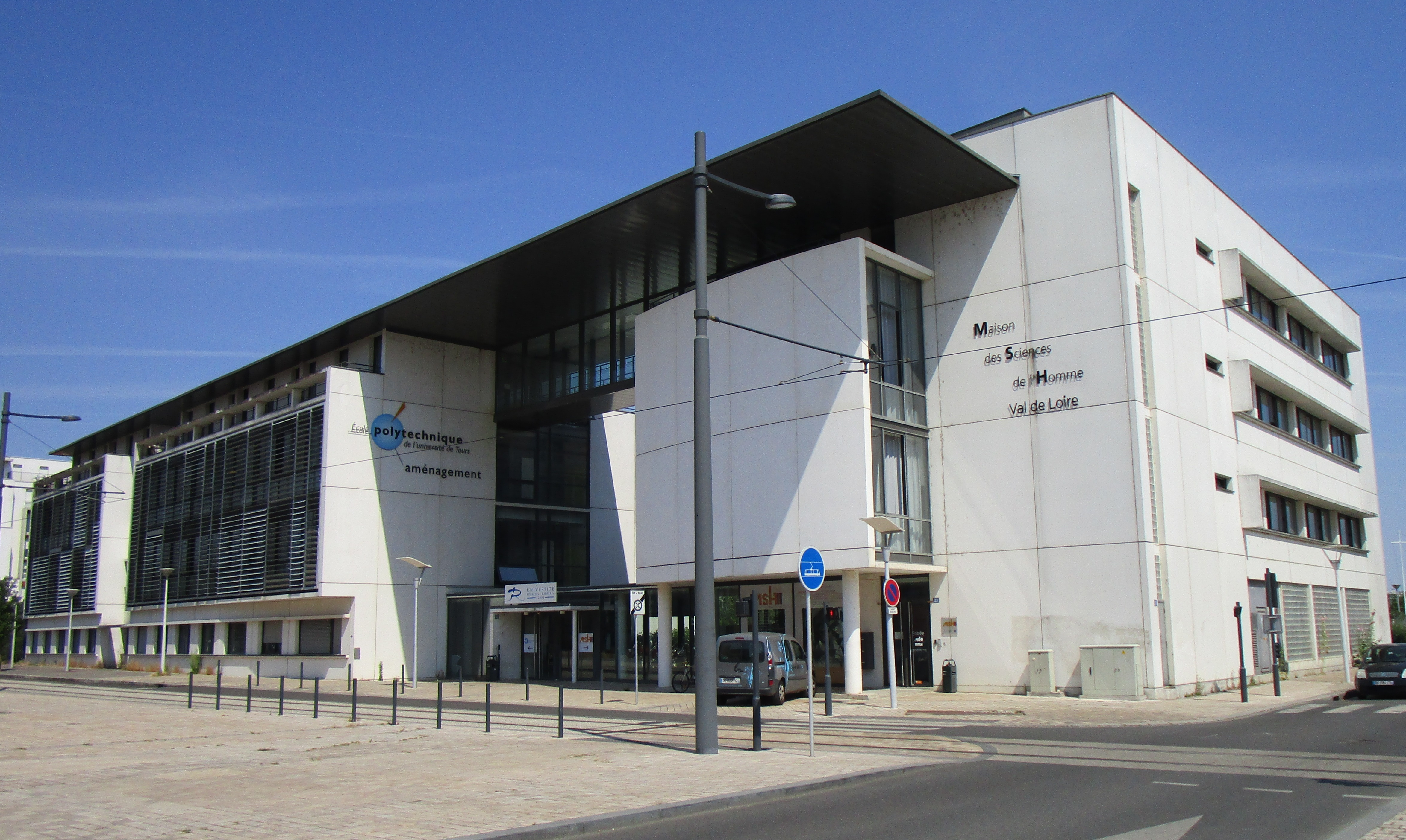 Le site Lesseps de l'École polytechnique de l'université de Tours, dans le quartier des Deux-Lions. Construit en 2004.